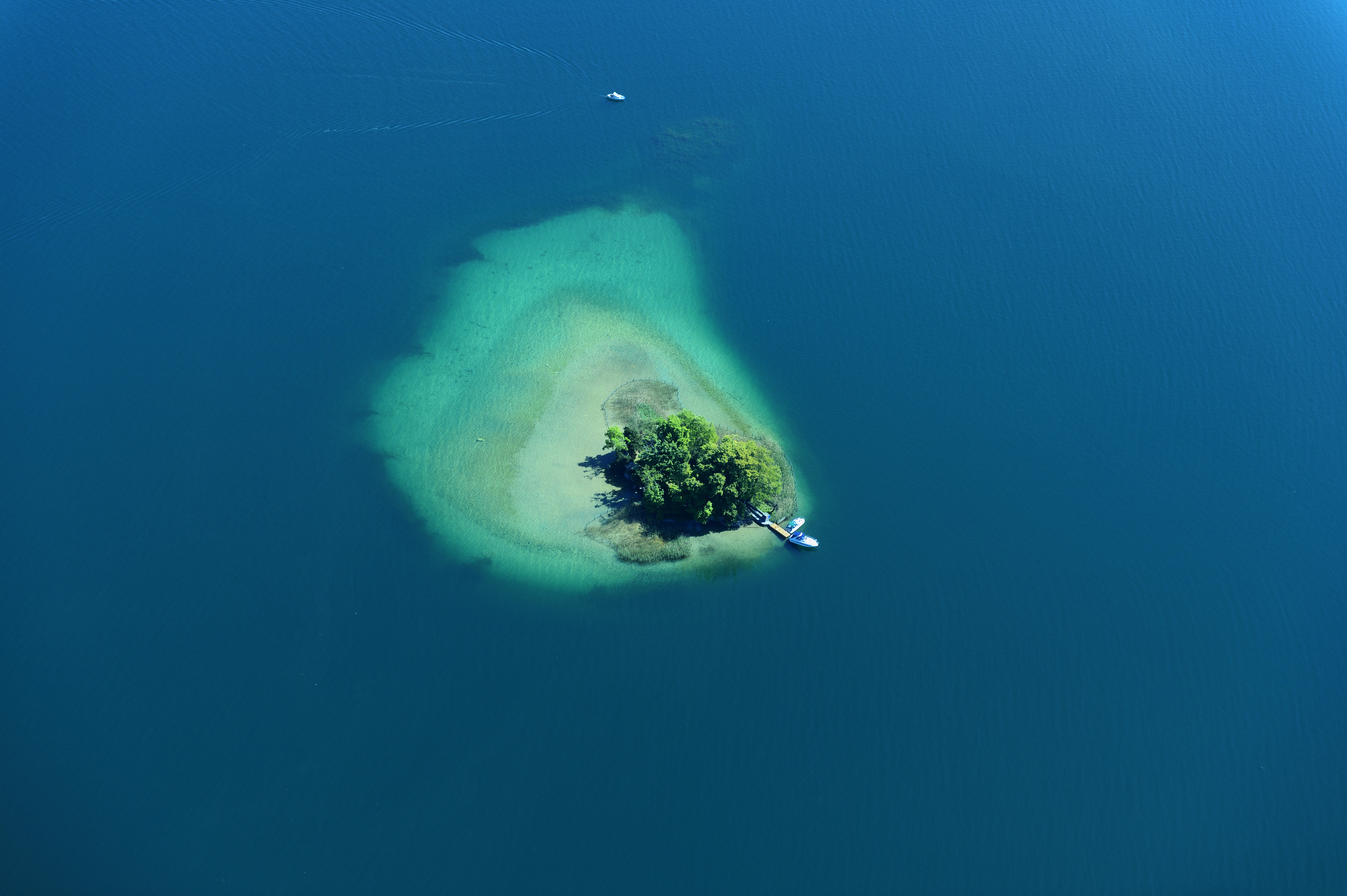 Insel Schönenwerd im Zürichsee